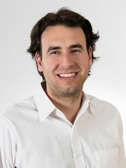 Vlado Mirosevic Verdugo en la fotografía oficial de diputados periodo 2018-2022. (Fotos: Christel Andler, René Lescornez, Johanna Zárate)